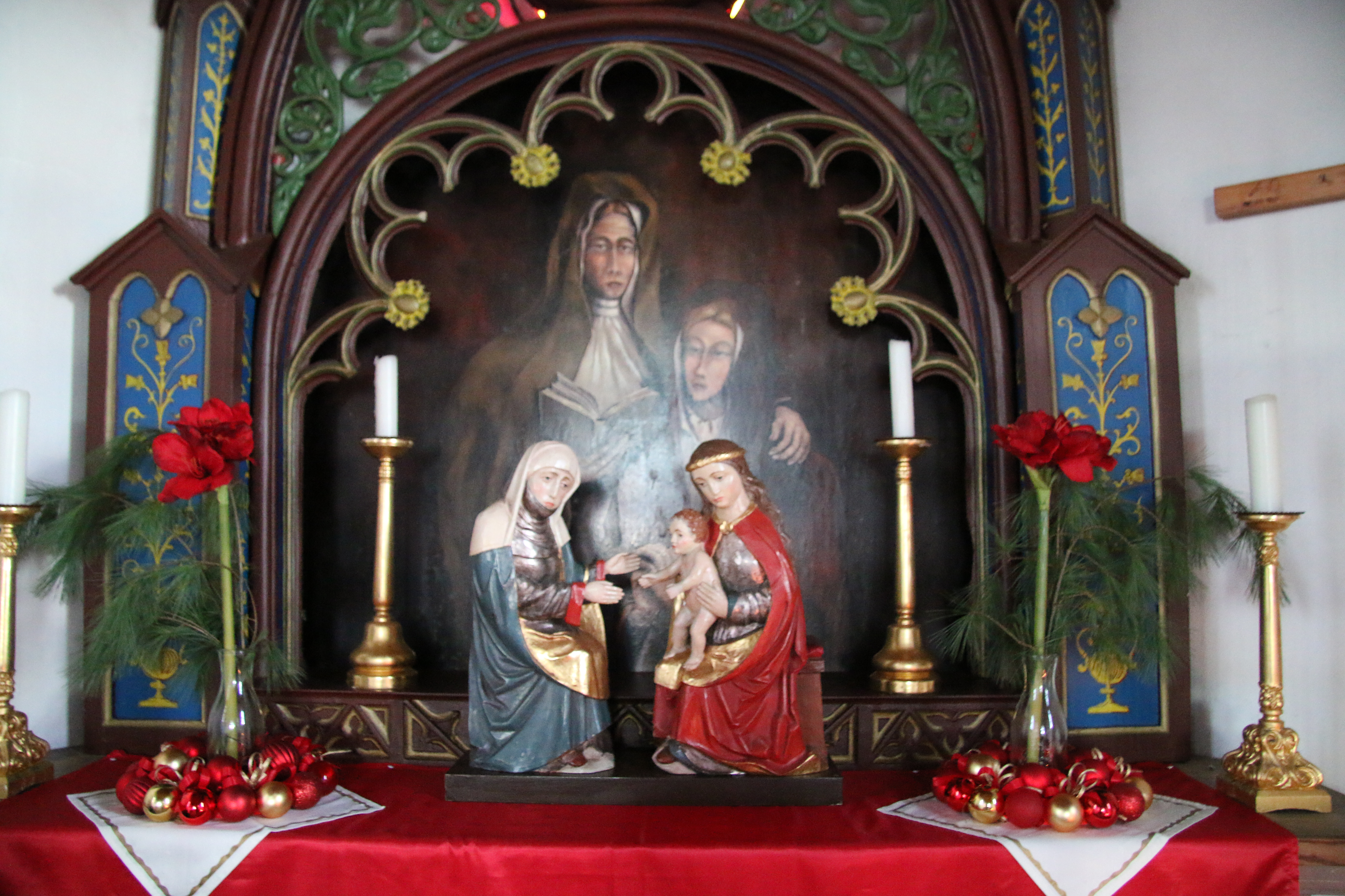 Altar mit dem Bild der heiligen Anna